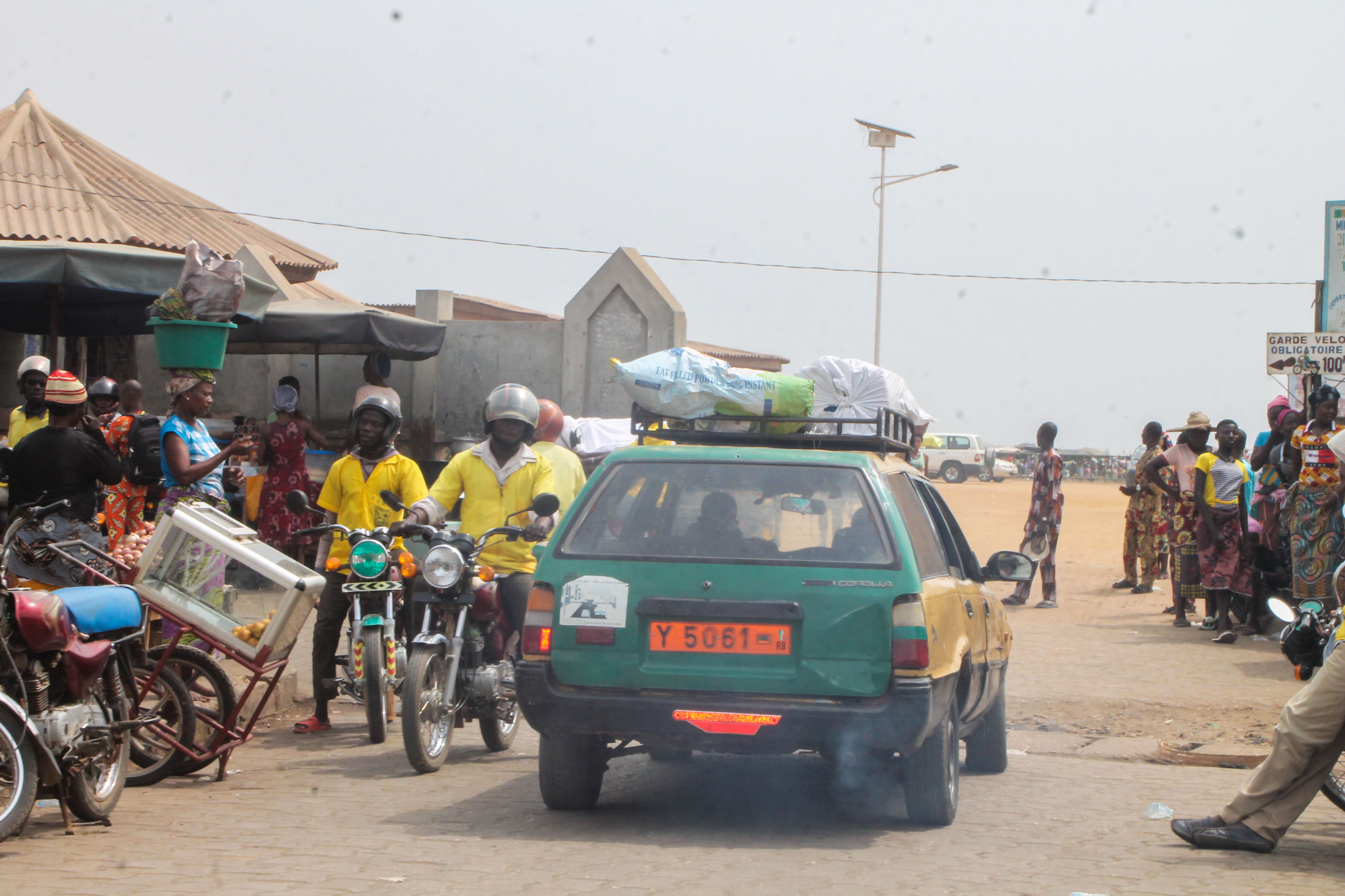 Taxi qui transporte des bagages This is an image with the theme "Africa on the Move or Transport" from: Benin